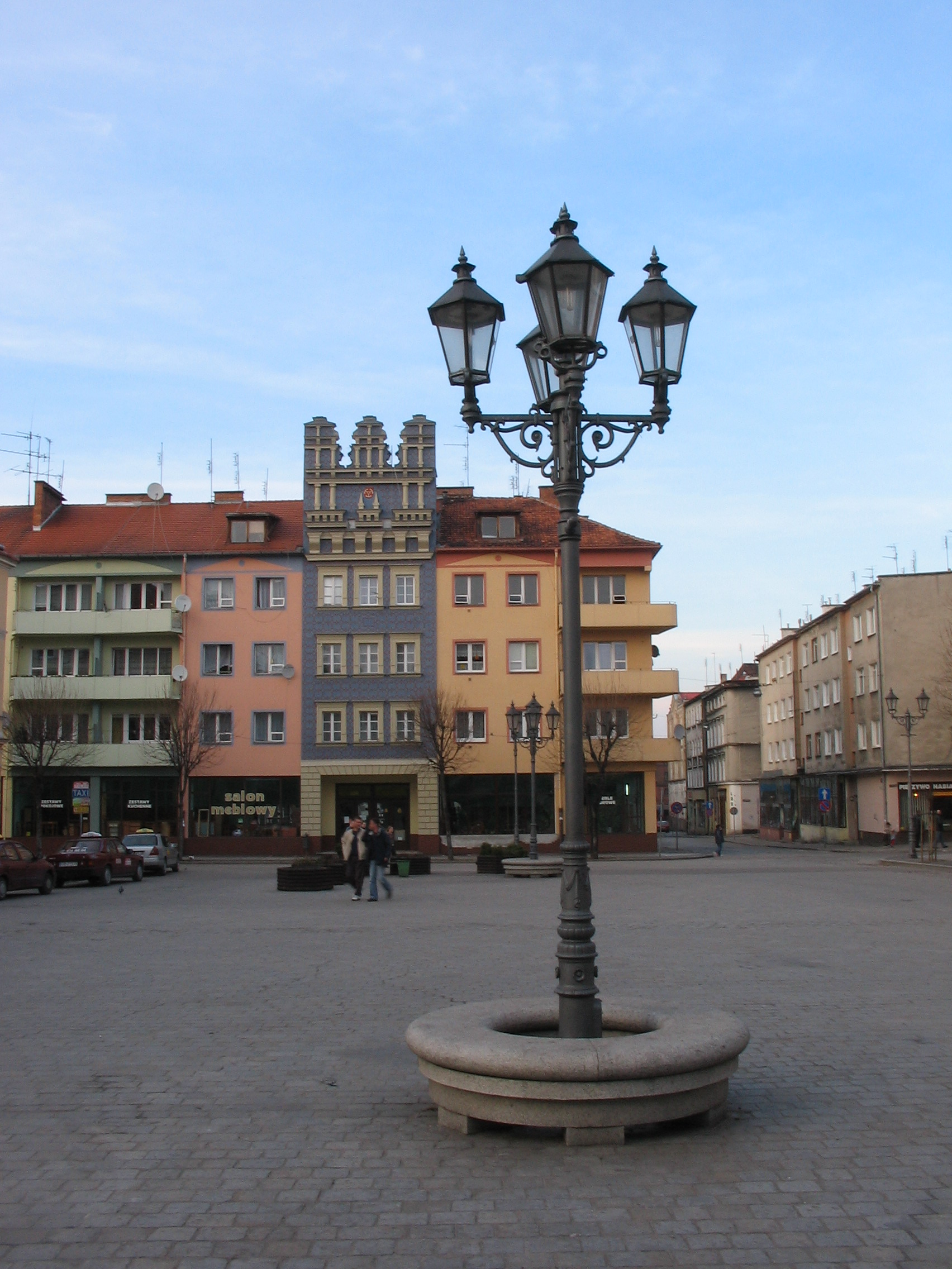 Kamienice na rynku w Brzegu